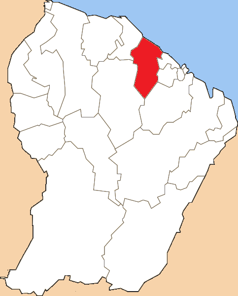 Situation du canton dans le département de la Guyane